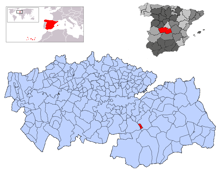 Manzaneque en la provincia de Toledo